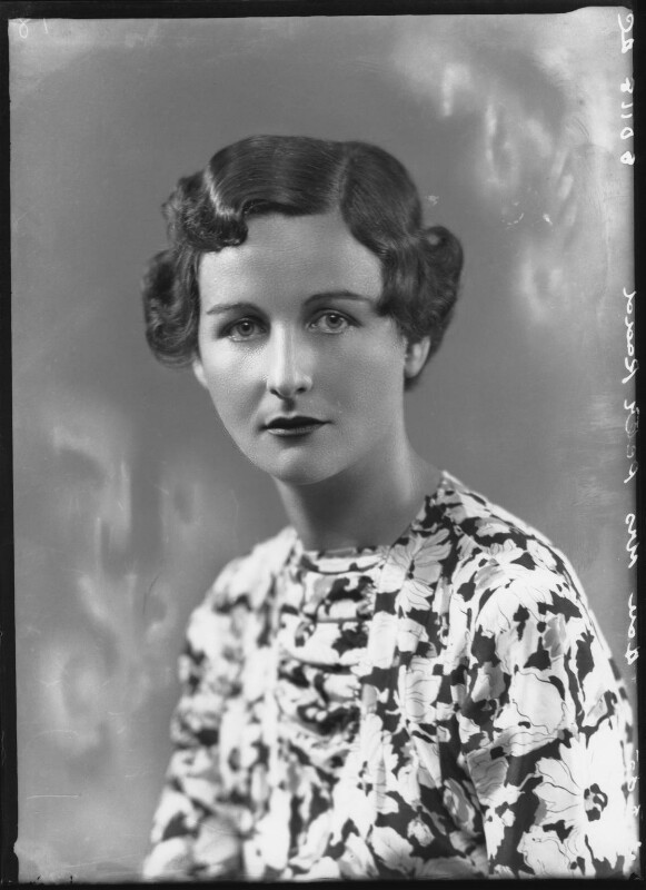 Nancy Mitford, 3 août 1935